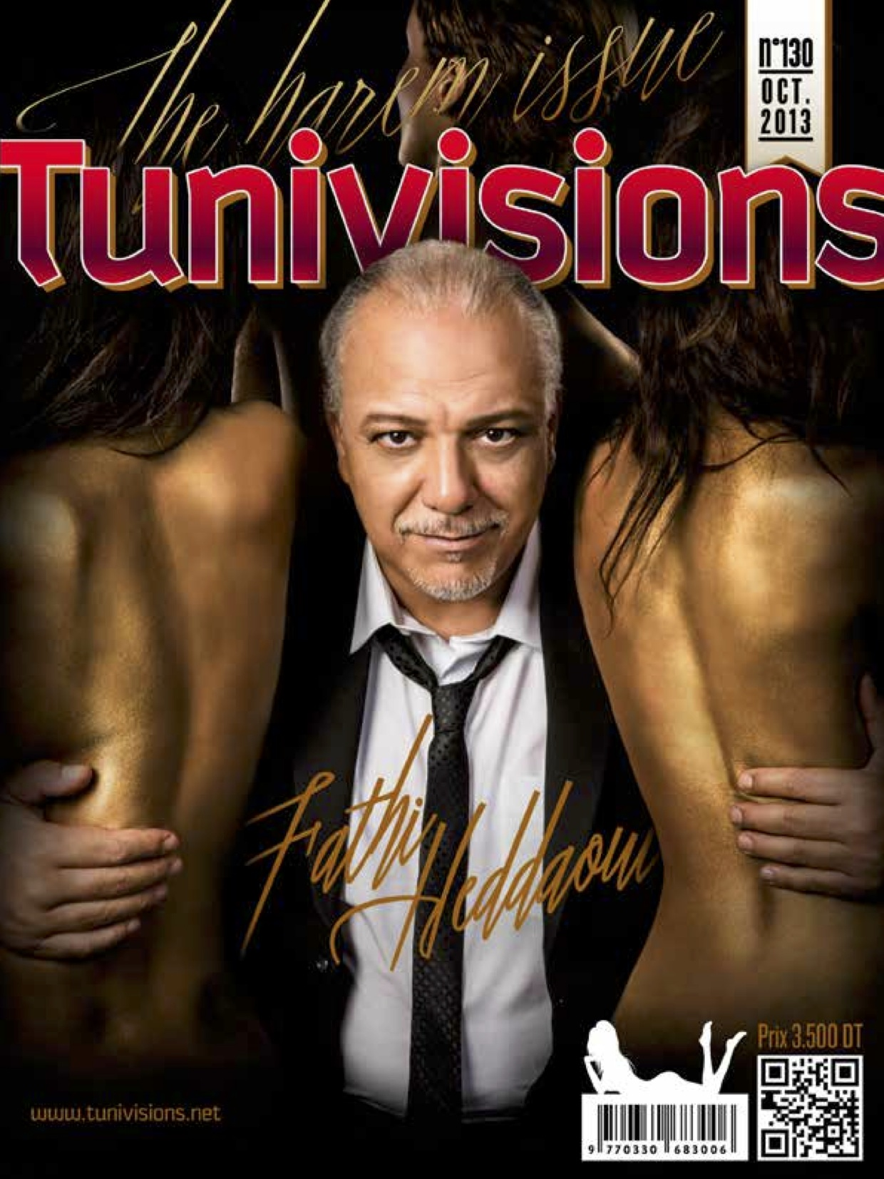 Couverture du numéro 130 du magazine tunisien Tunivisions.